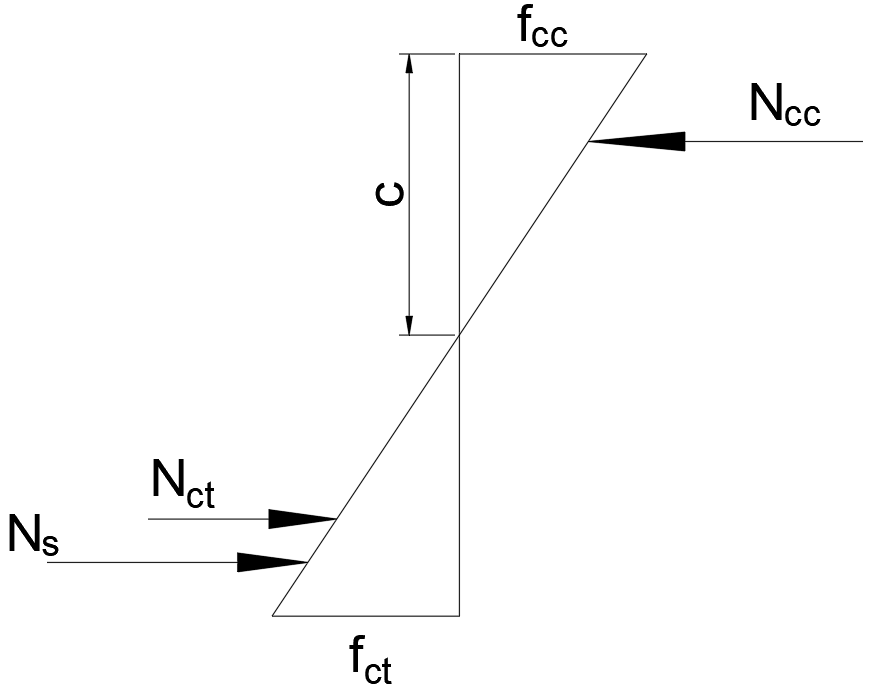 단철근 콘크리트 보의 균열 발생 시 응력분포